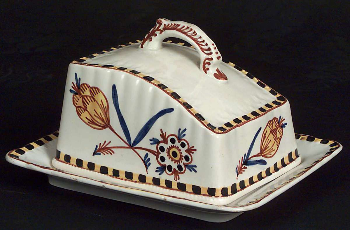 Osteklokke med fat av keramikk stemplet EGERSUND FAYANCEFABRIKS Co. Lengde fat: 22,5 cm. Foto: Anne.Lise Reinsfelt / Norsk Folkemuseum, NF.1966-1113AB.